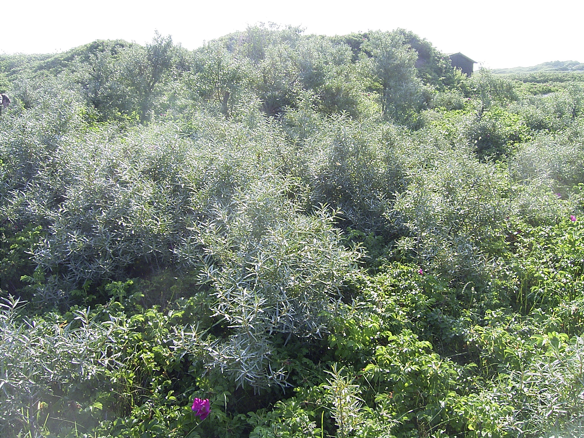 Sanddorn (Hippophae rhamnoides), Düne (Helgoland), Deutschland